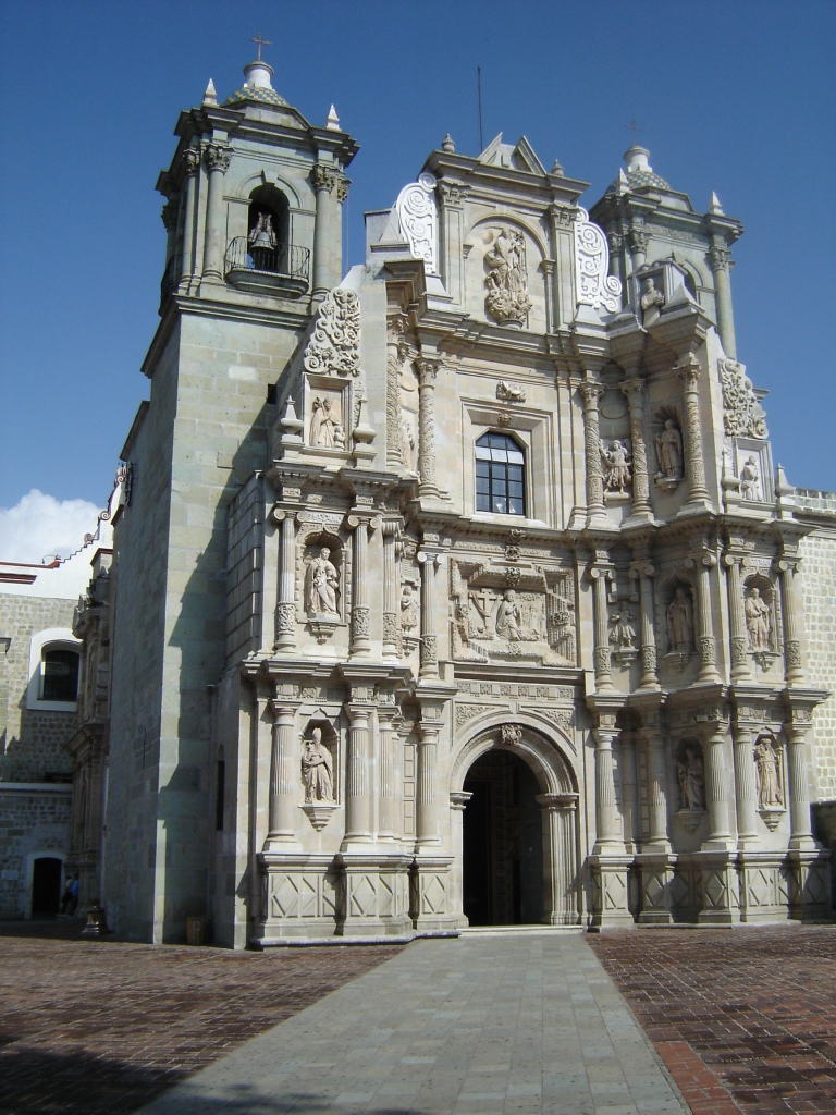 templo de la soledad em el centro de oaxaca